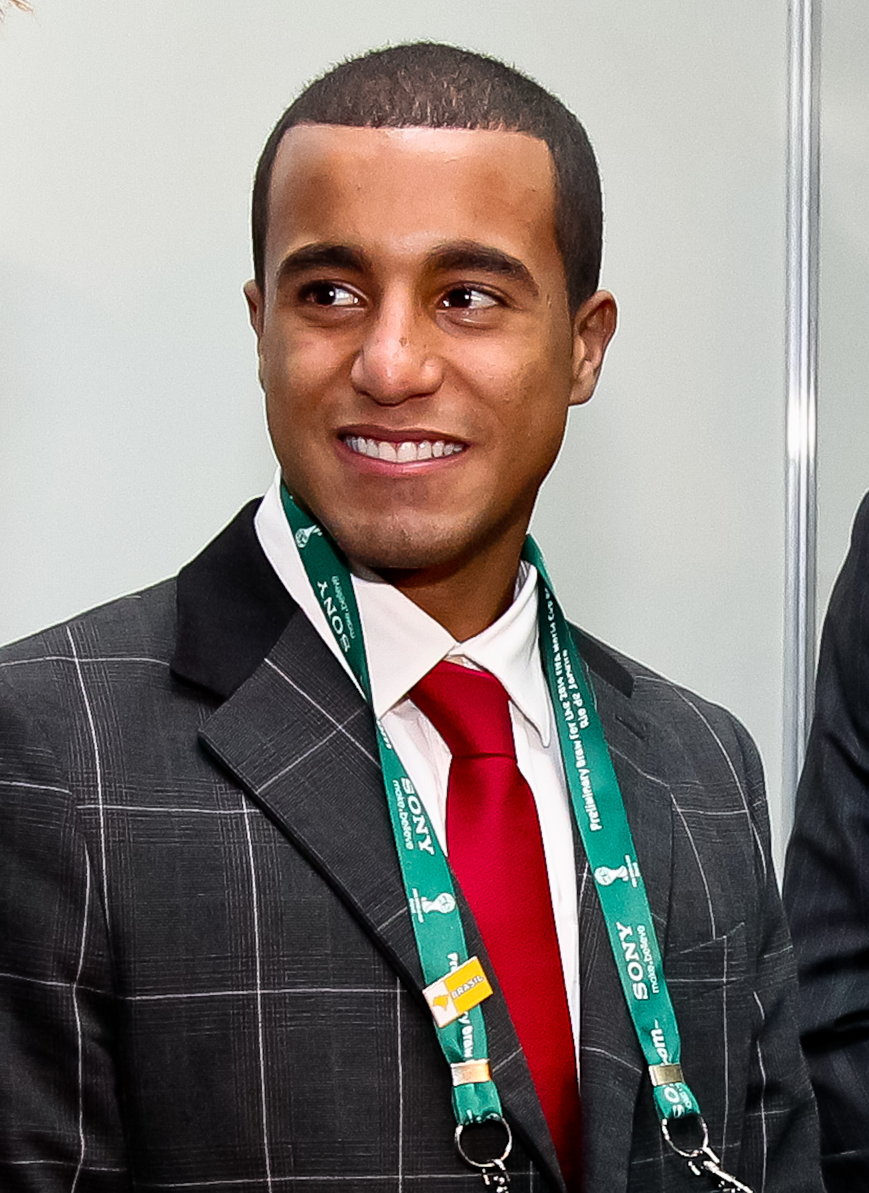 Presidenta Dilma Rousseff cumprimenta o jogador Neymar após o sorteio preliminar da Copa do Mundo da Fifa Brasil 2014 (Rio de Janeiro,RJ,30/07/2011) Foto: Roberto Stuckert Filho/PR